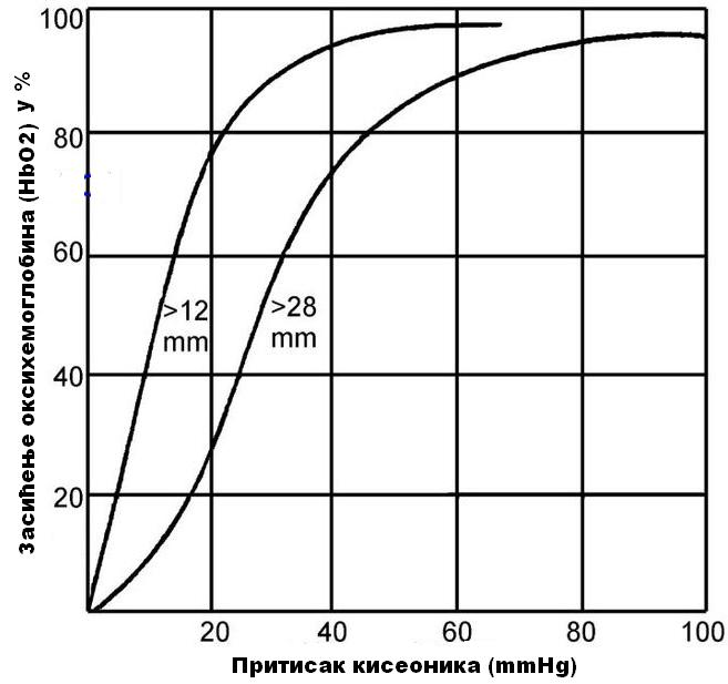 Trovanje ugljen-monoksidom pomera krivu disocijacije HbO2 u levo, dr M.Dimić, Niš, 21.oktobar 2009.